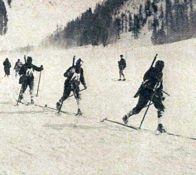 La patrouille militaire suisse, championne olympique en 1924 à Chamonix.